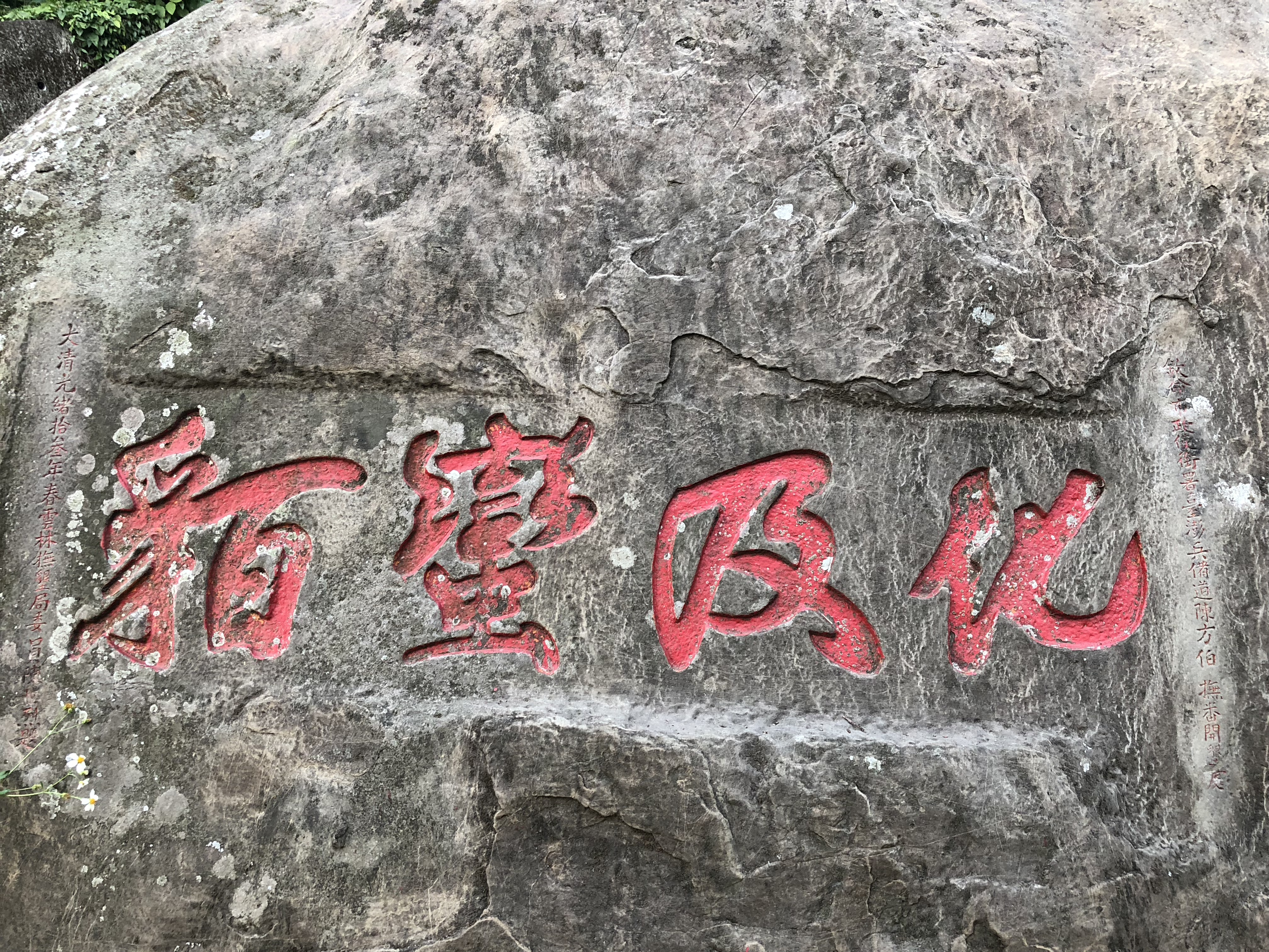 國家一級古蹟集集鎮化及蠻貊(近照)